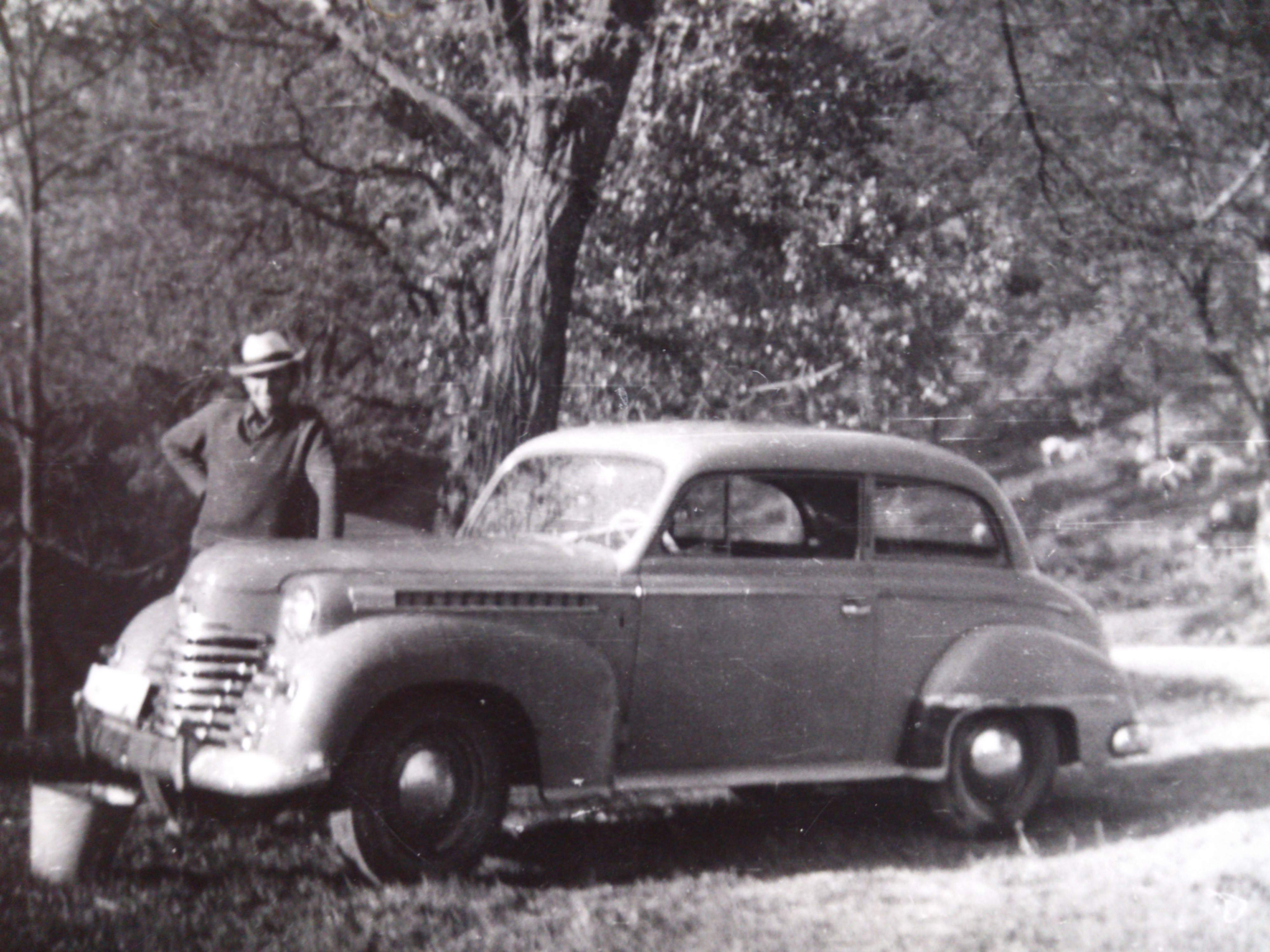 Први аутомобил у Шаранима. Купио га је Никола Младеновић, који је на фотографији, почетком 1960их. Путеви у селу су били веома лоши у то време, јер су њима већином пролазила запрежна кола. Тек 1970их путеви су асфалтирани, и аутомобили су преузели примат за транспорт људи и робе. Фотограф је непознат, а фотографија је власништво Богдана Јовановић из Шарана.